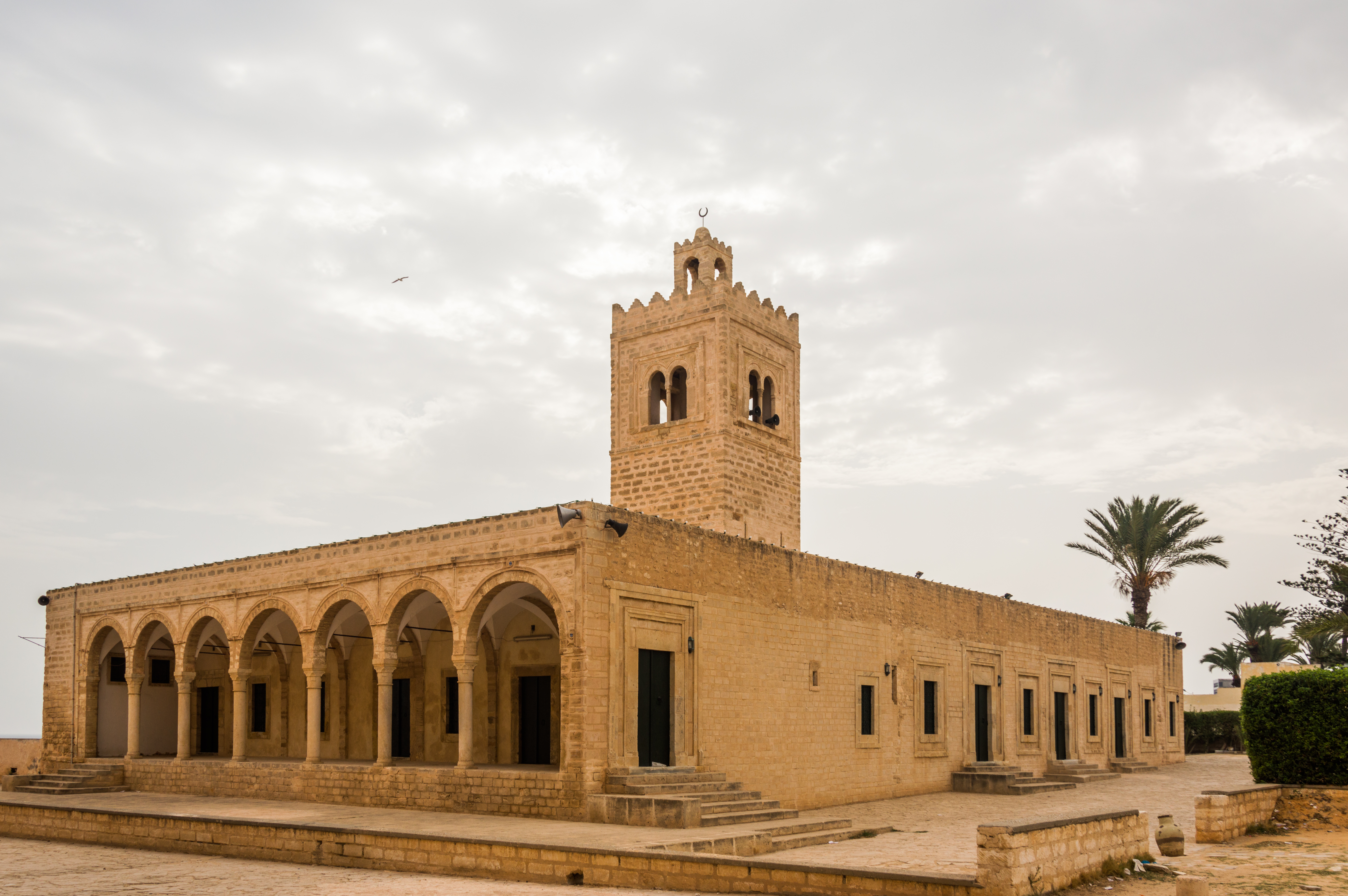 Mesjed de la Saïda (mère de l'Émir Badis)